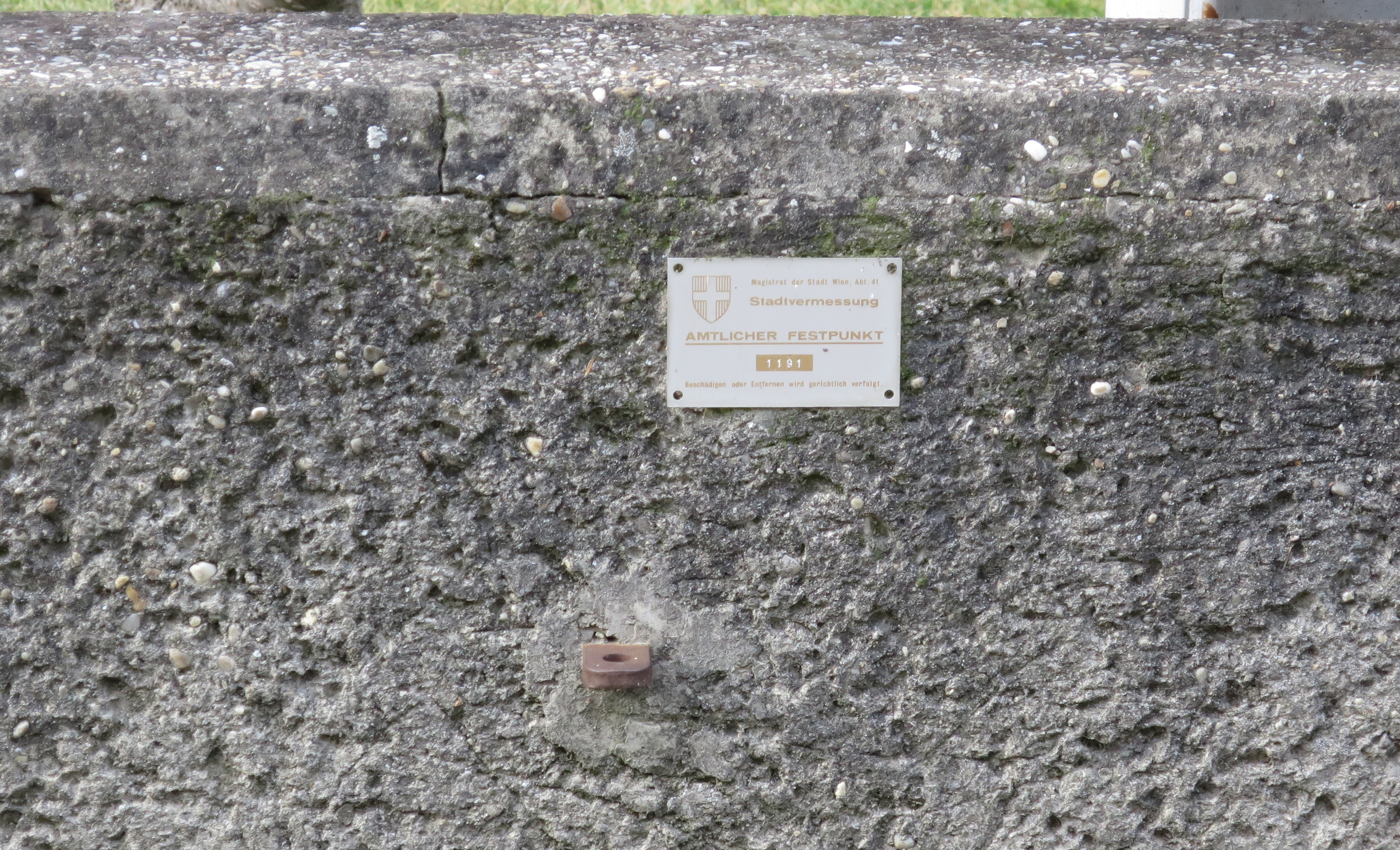 Wien, Enzianweg. Gabelpunkt als Amtlicher Festpunkt 1191. Rechte der zwei Eisenmarken, Warntafel aus Aluminium.